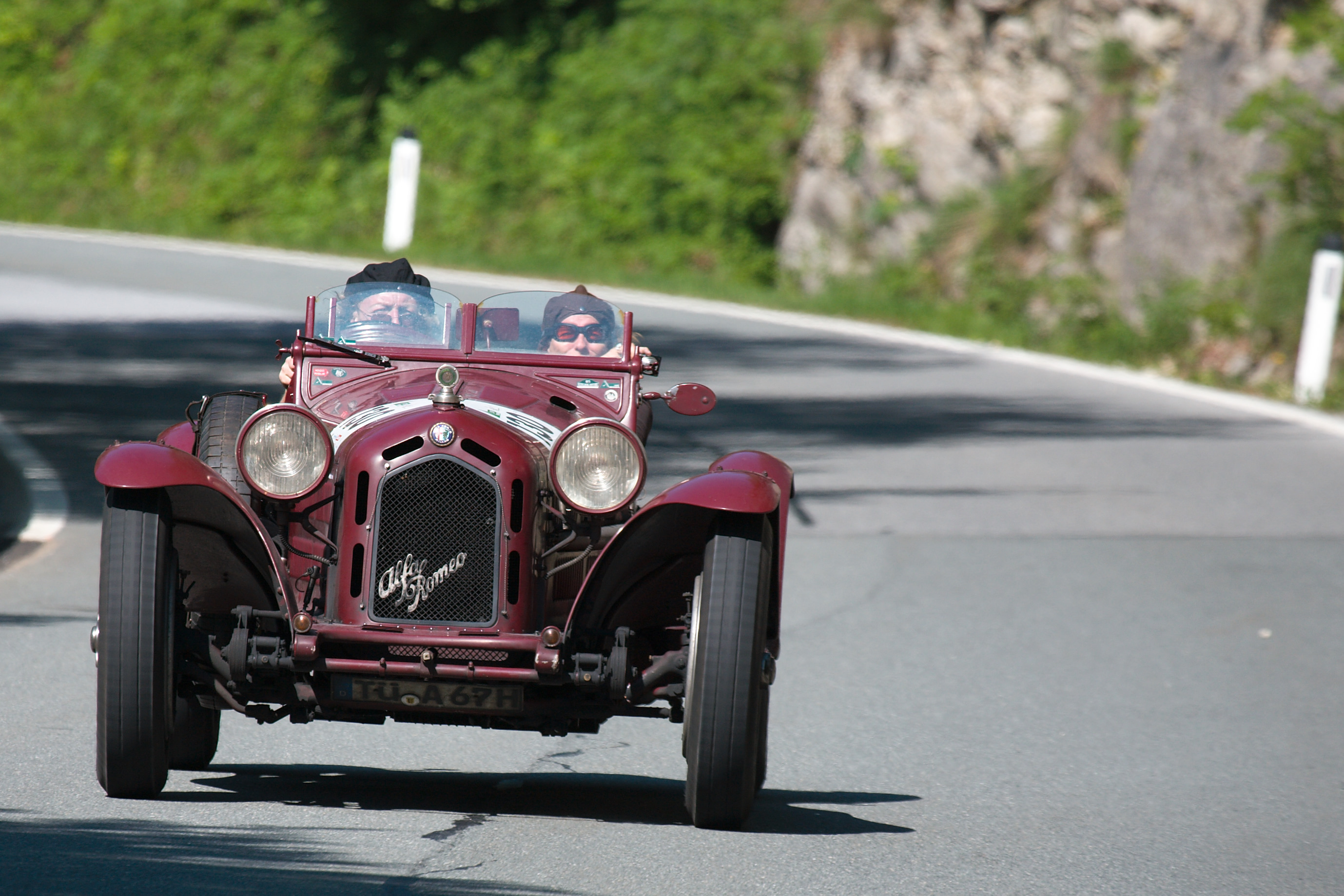 Alfa Romeo 8C Monza at Gaisbergrennen 2009